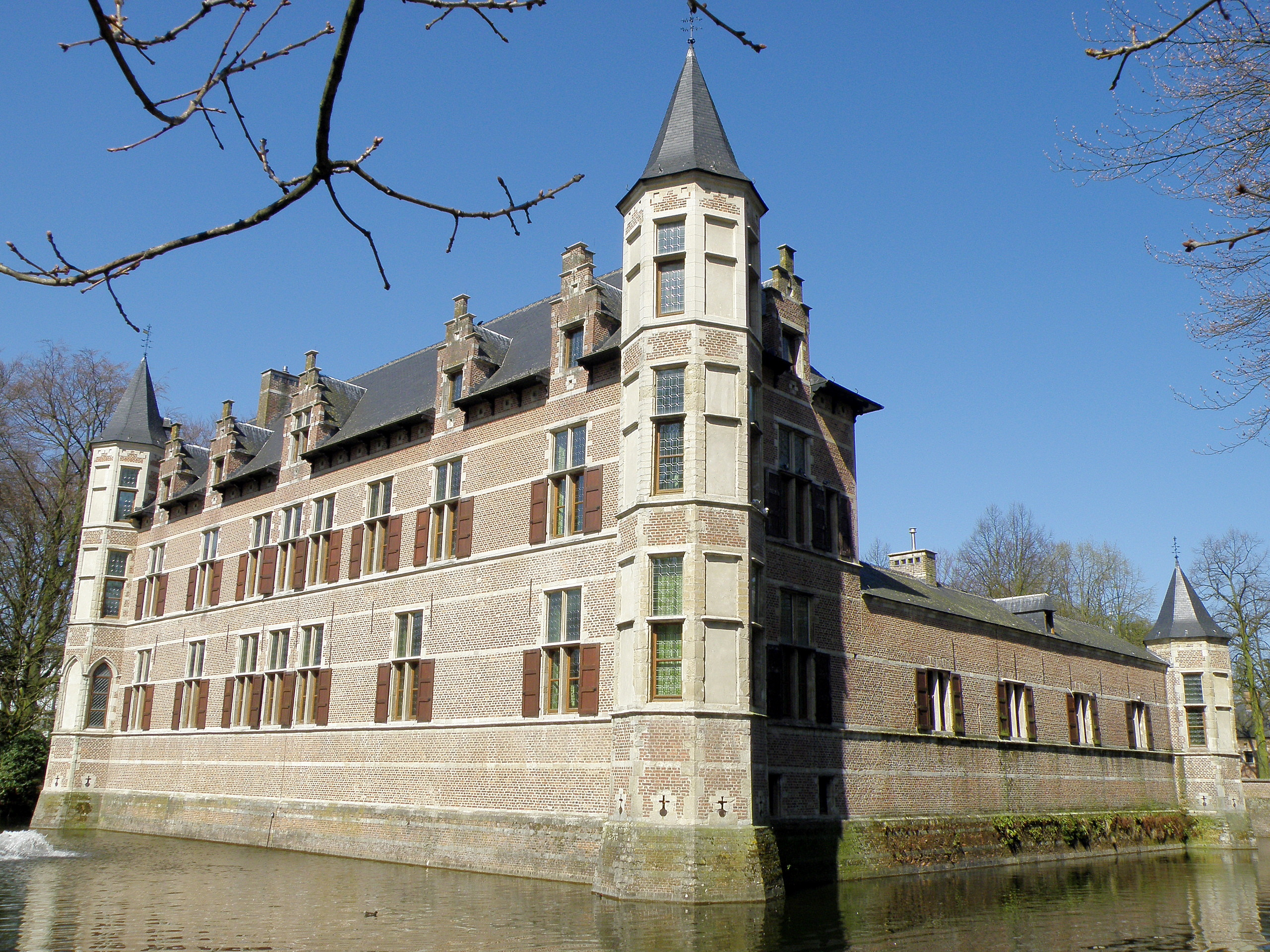 Antwerpen, district Ekeren. Hof van Veltwijck, voormalig "hof van plaisantie", 16de eeuw, thans districtshuis van Ekeren. Tweede bouwlaag van zuidervleugel (links op foto, =hoofdvleugel) aangebracht door Henri en Leonard Blomme in 1905. Vgl. verder beschrijving in Inventaris Vlaams onroerend erfgoed.